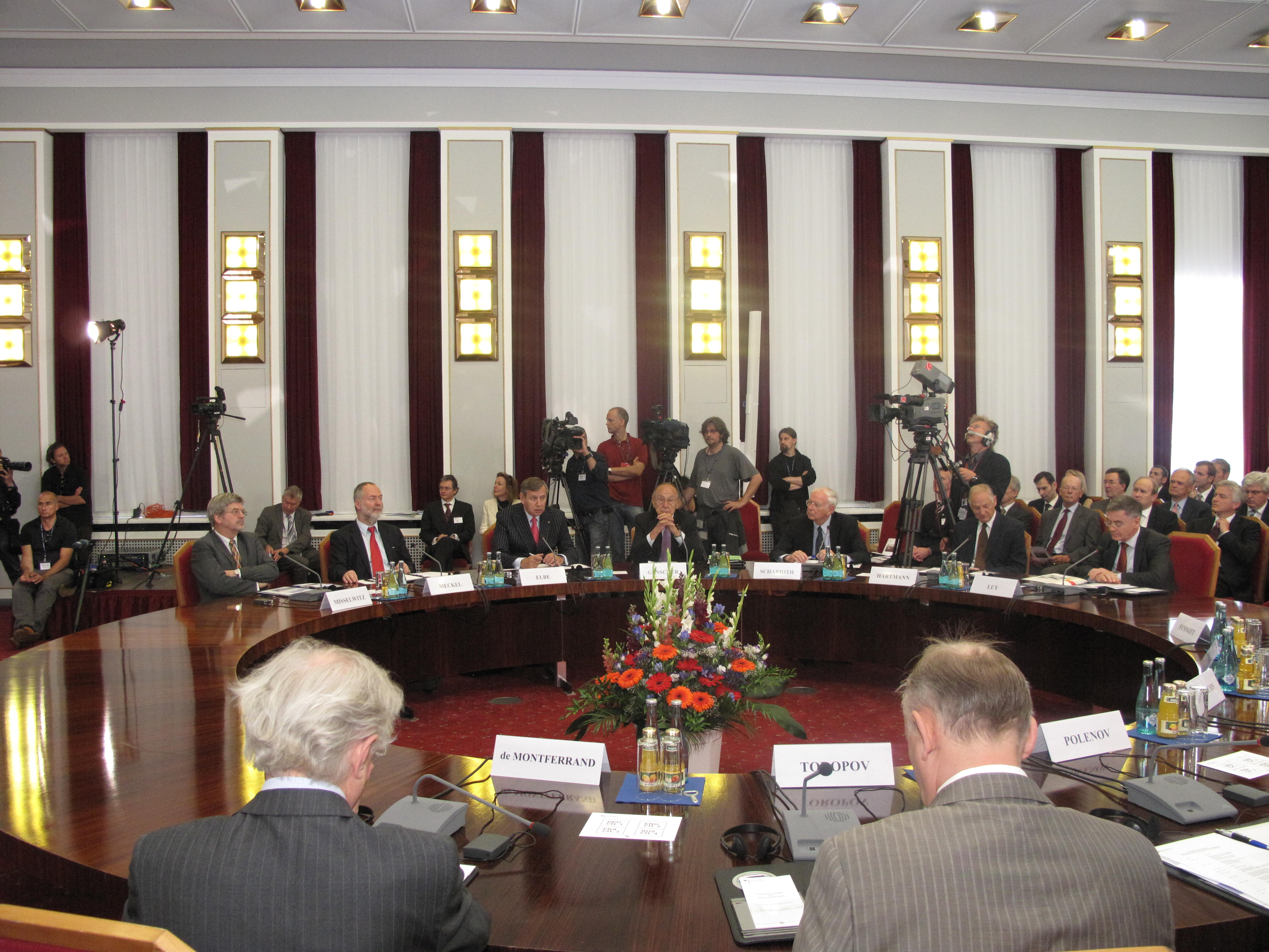 Festakt zum 20-jährigen Jubiläum der 2+4 Verträge an der Bundesakademie für Sicherheitspolitik mit Bundesminister a.D. Hans – Dietrich Genscher.